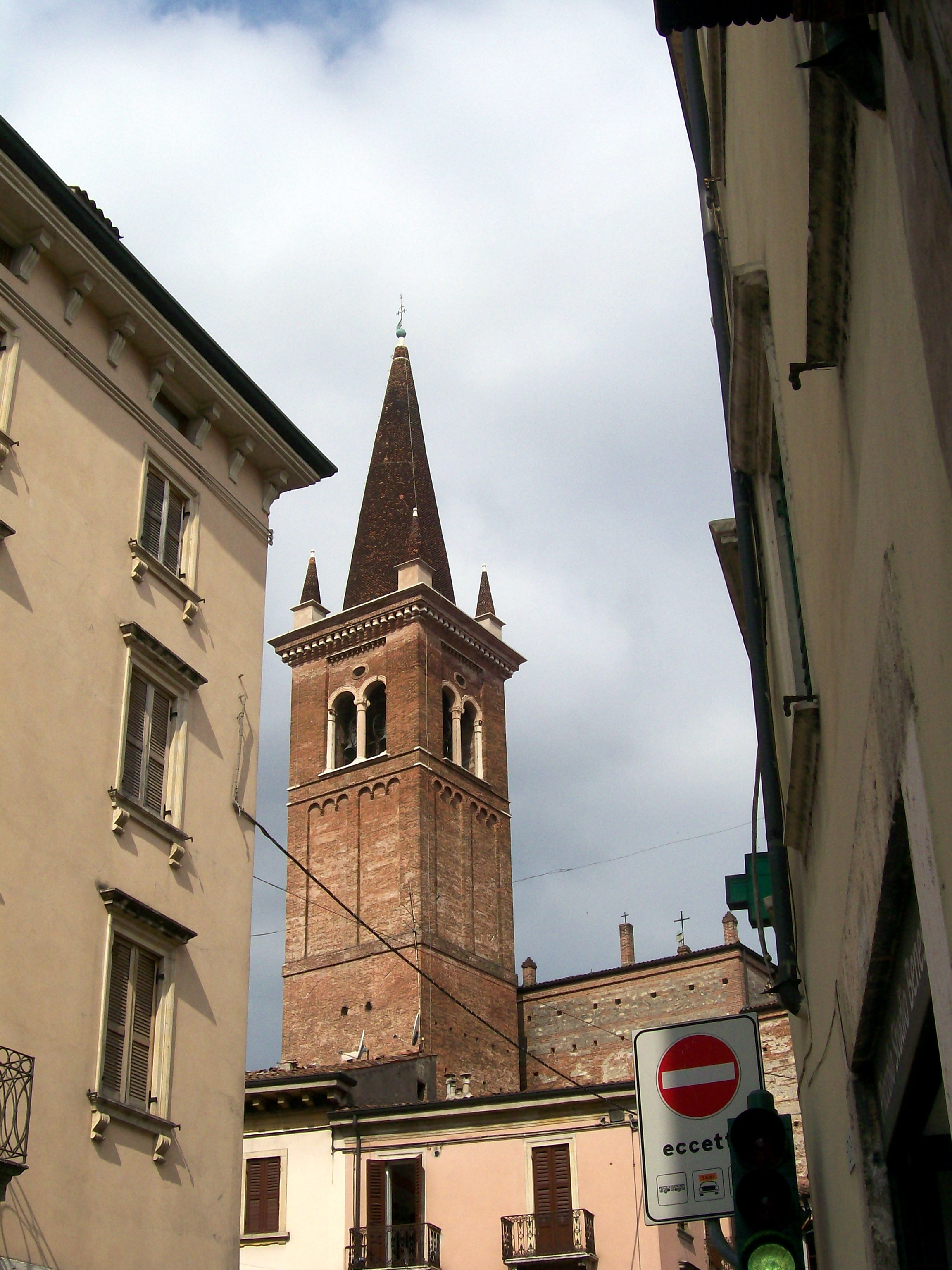 Campanile della chiesa parrocchiale di San Tommaso Cantuariense in Verona.